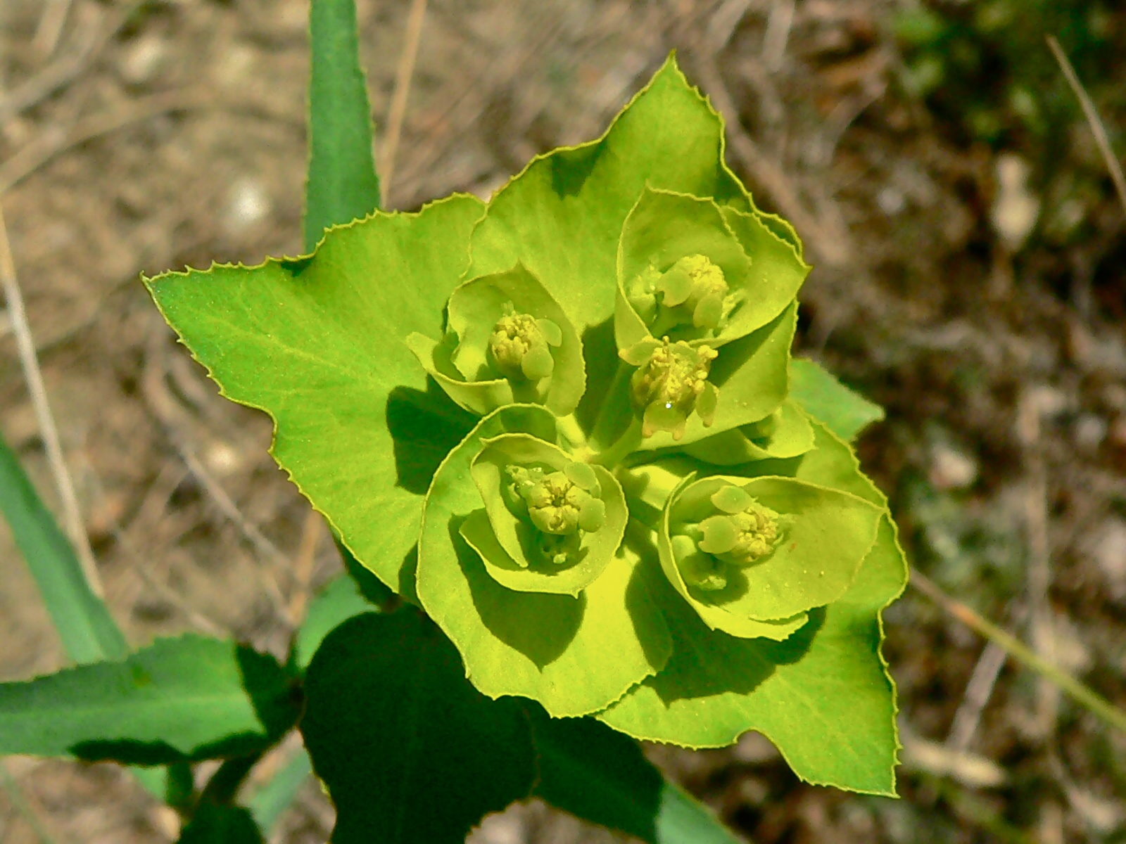 Alignan-du-Vent, Hérault FRANCE